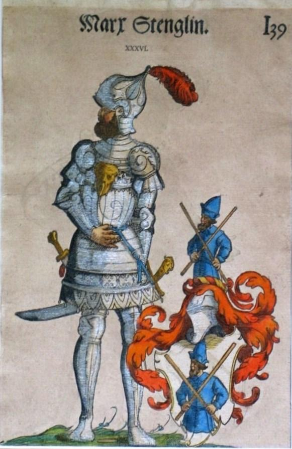 Wappen der alten schwäbischen Patrizierfamilie Stenglin mit gerüstetem Schildhalter (konkret für Marx [Markus] Stenglin), Farbgebung des Wappens jedoch eine Variante im Vergleich zu anderen historischen Abbildungen.